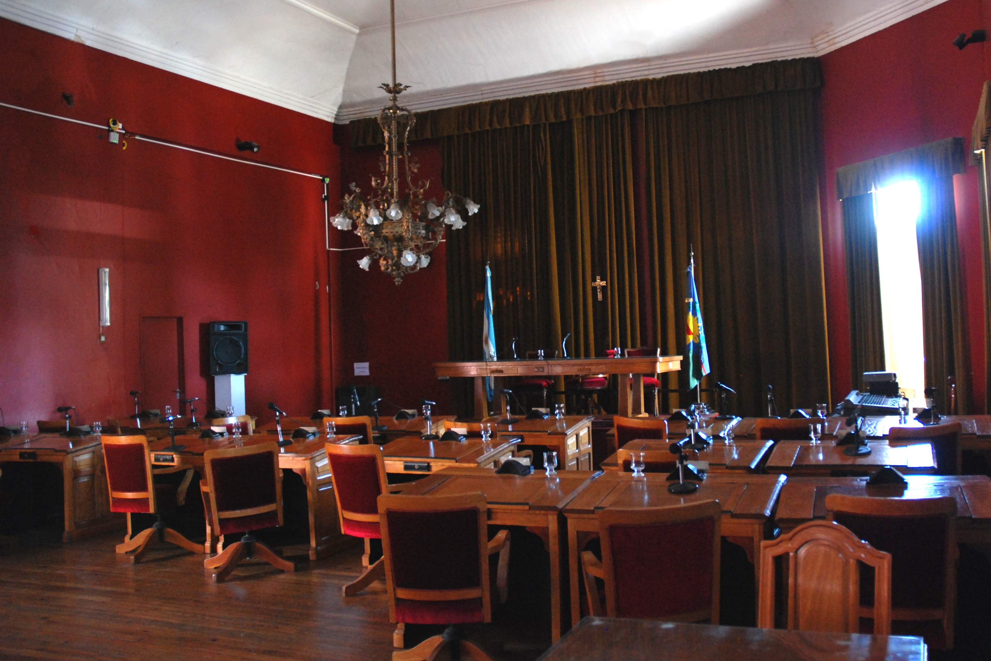 Palacio Municipal de Junín, Argentina. Vista del salón de Honorable Concejo Deliberante.